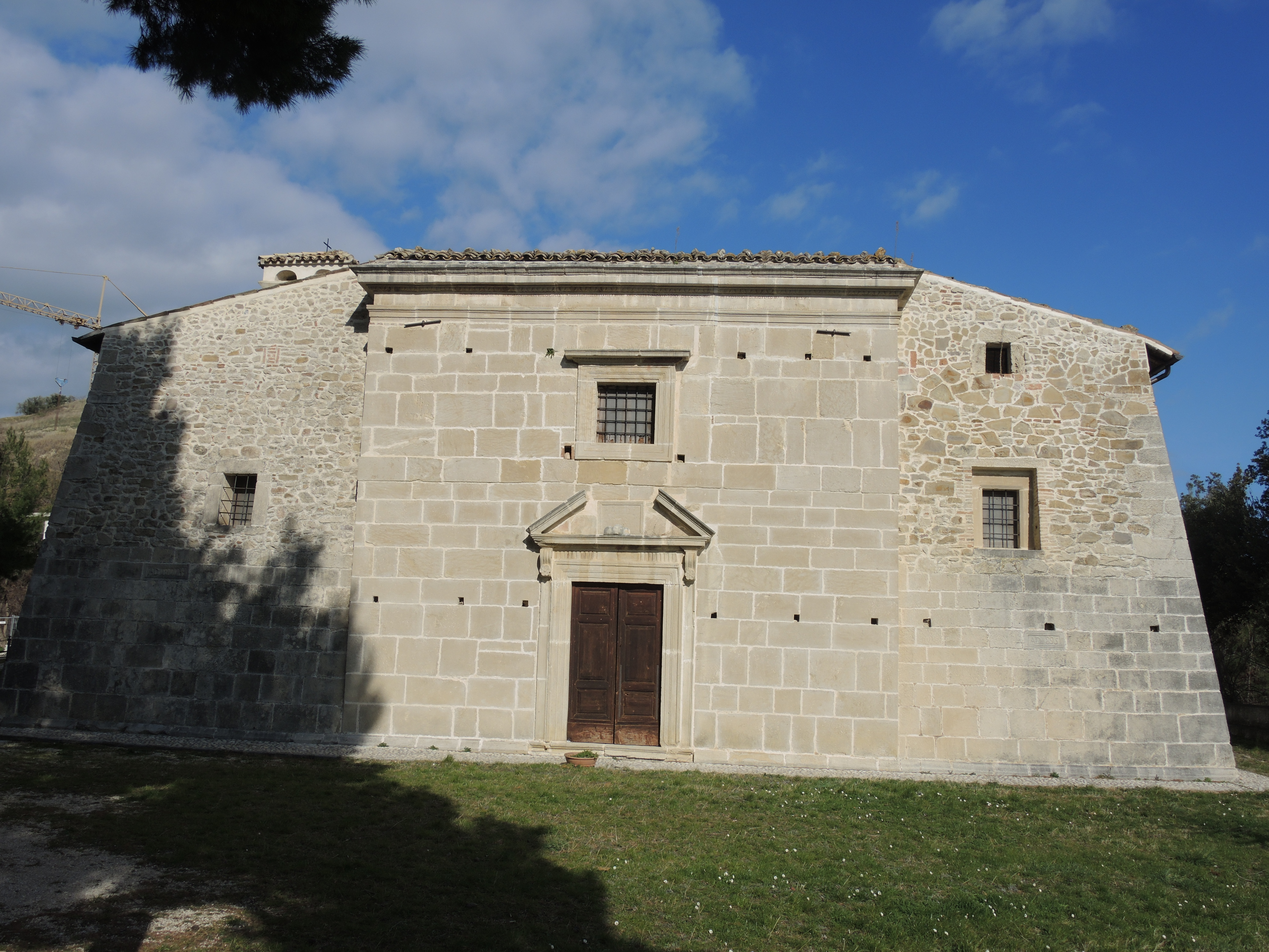 Pietranico: Oratorio di Santa Maria della Croce